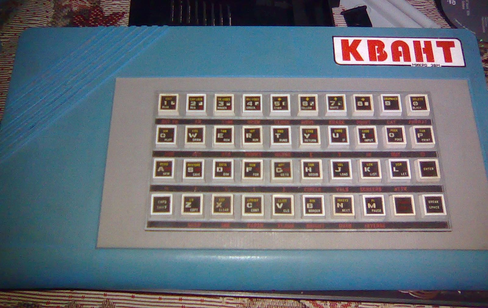 Клон ZX Spectrum Квант (г. Орша)